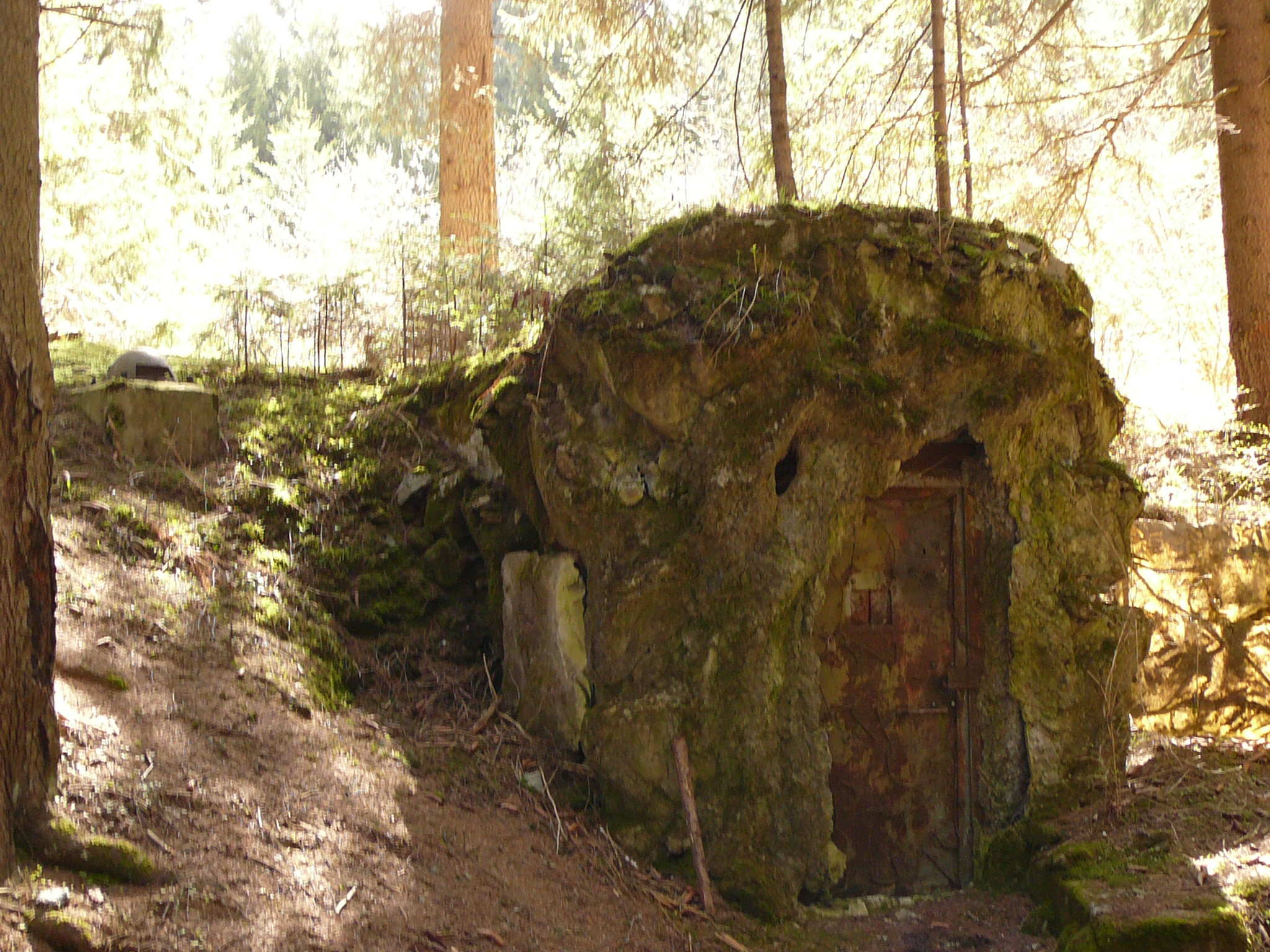 opera 4, sbarr drava